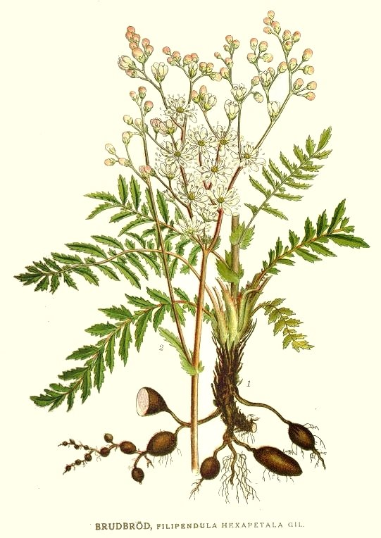 Filipendula vulgaris Moench, syn. Filipendula hexapetala Gilib. Original Description Brudbröd, Filipendula hexapetala Gil.